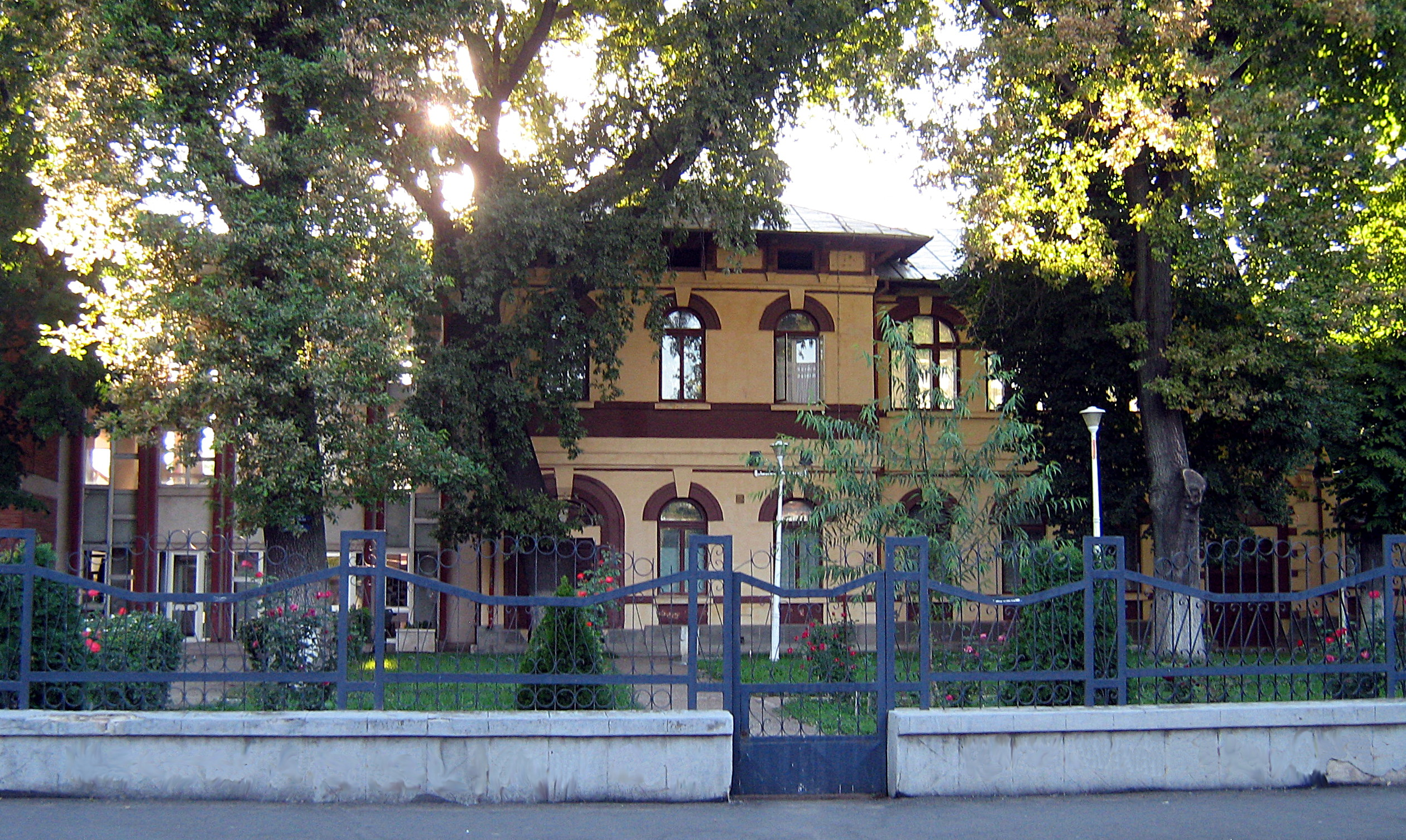 Galaţi, Şcoala tip Spiru Haret, azi Colegiul Vasile Alecsandri